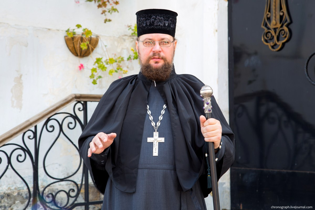 Настоятель Сызранского вознесенского мужского монастыря игумен Марк (Алексеев)